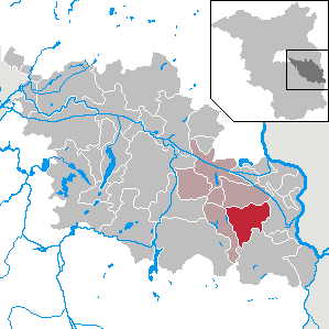 Schlaubetal in Brandenburg (Country) - District Oder-Spree